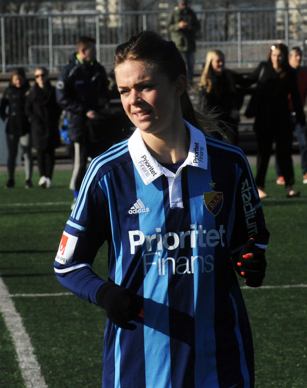 a_90_8194